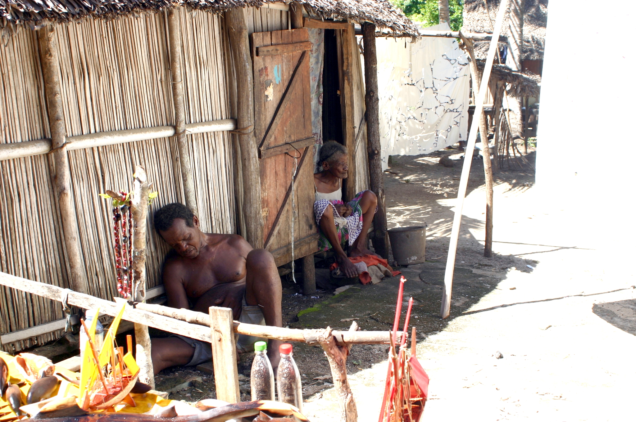 A vilage in Madagascar